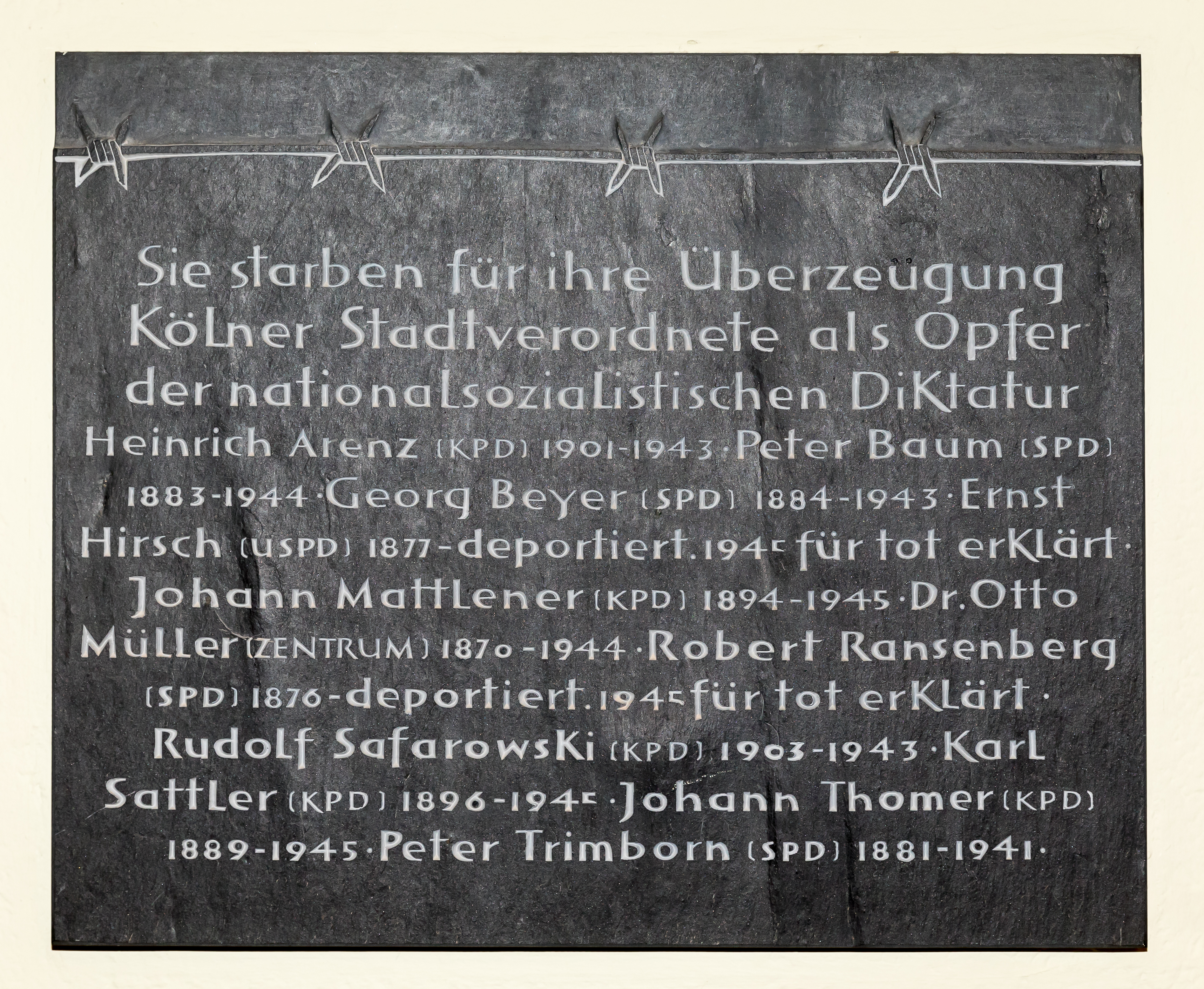 Gedenktafel Kölner Stadtverordnete als Opfer der NS-Diktatur. Spanischer Bau, Köln